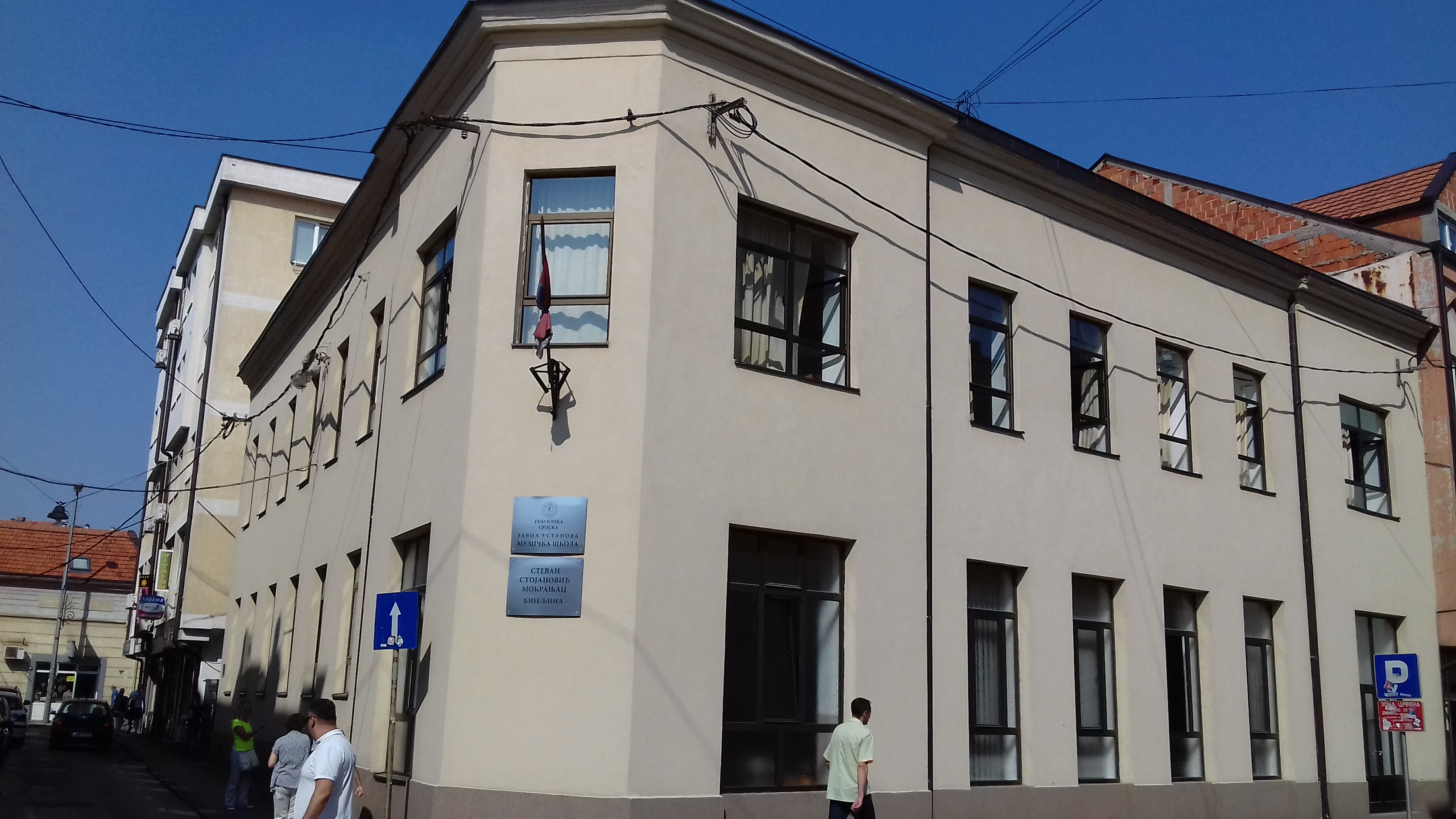 Srpski (latinica): Srednja muzička škola u Bijeljini